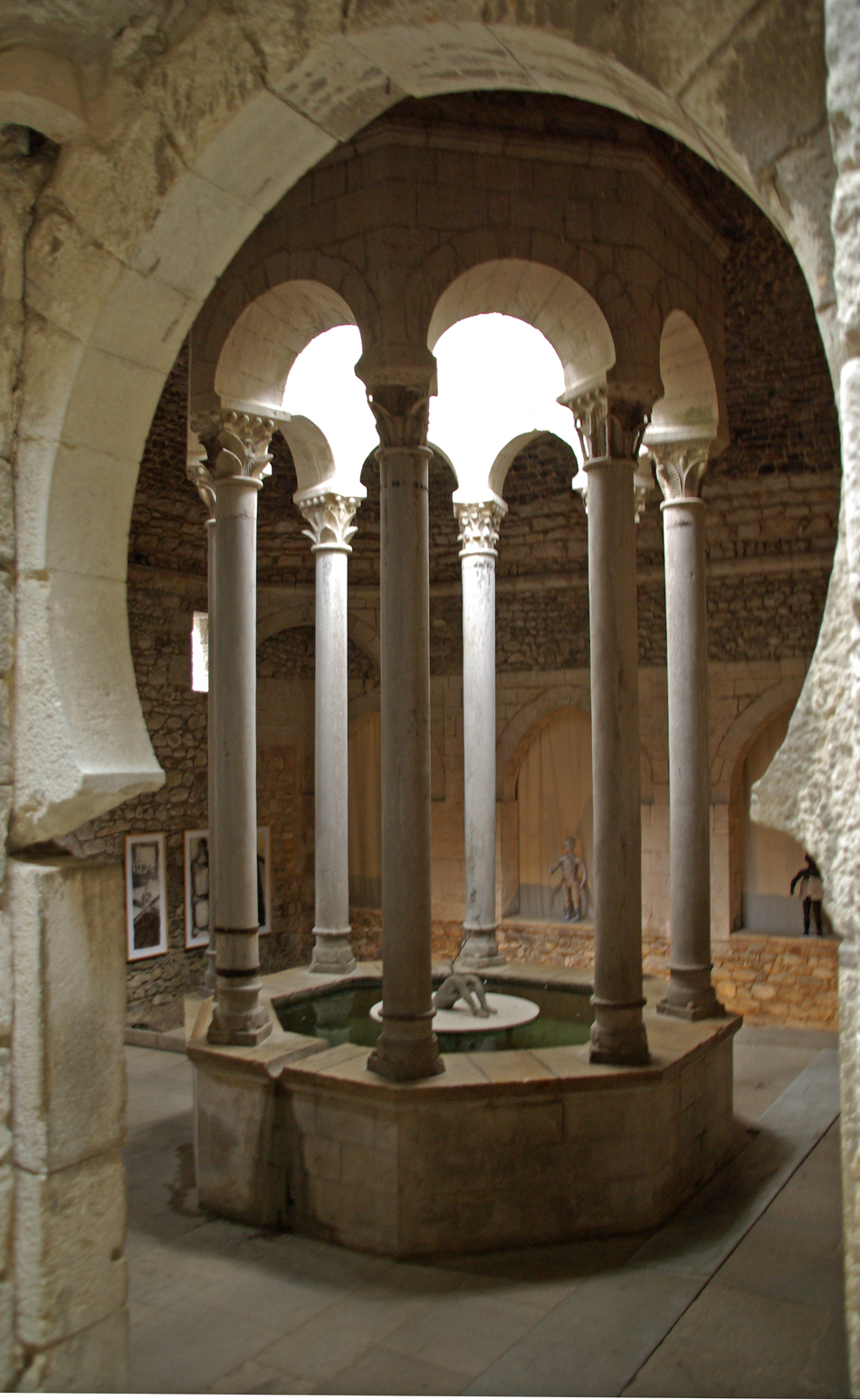 Banys Àrabs (Girona)